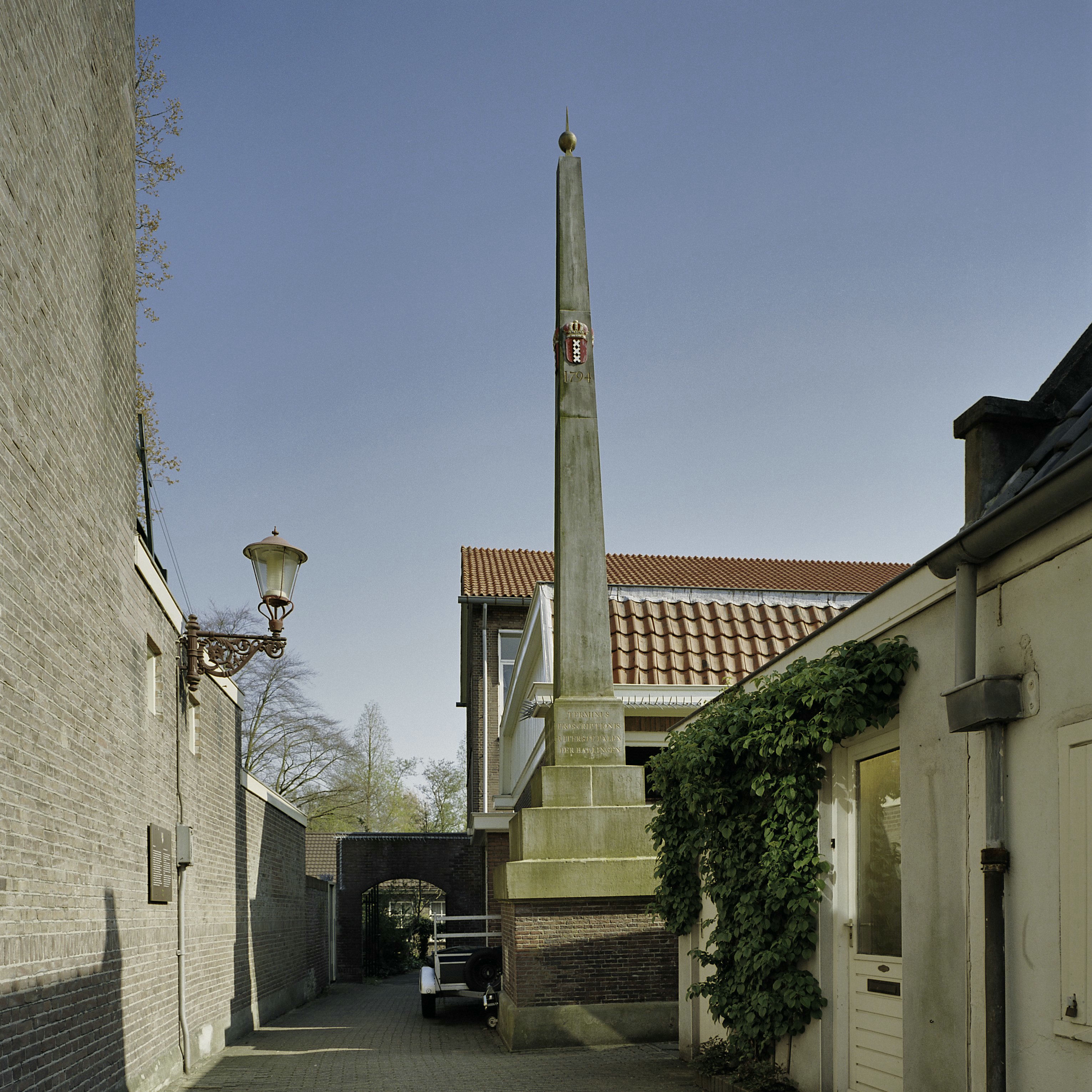 Banpaal: Op bakstenen voet staat een zandstenen obelisk met het Amsterdamse wapen (opmerking: Gefotografeerd voor Monumenten In Nederland Noord-Holland)